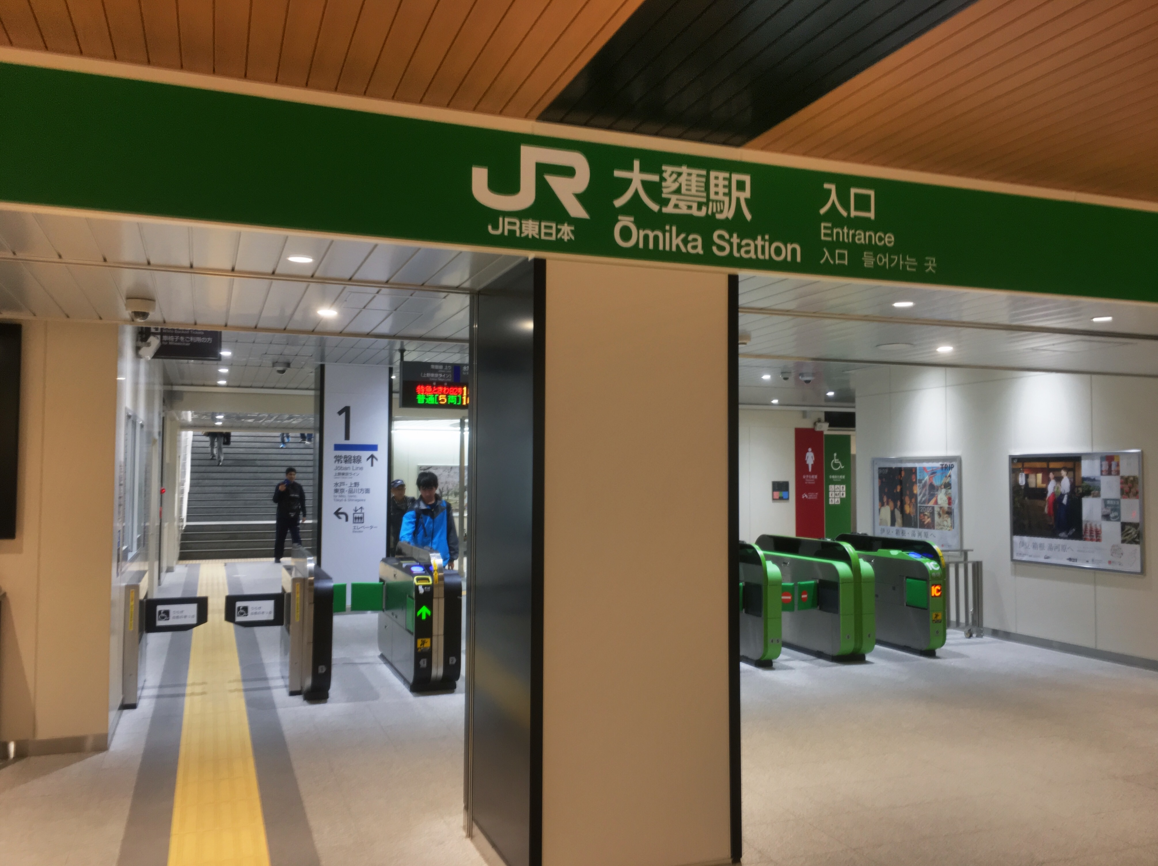 大甕駅 (Ōmika Station)